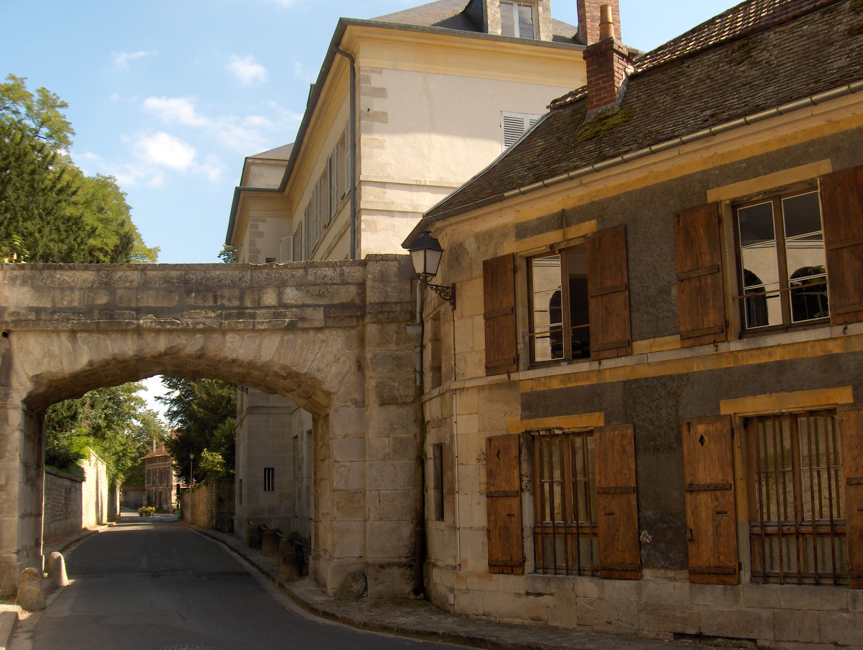 Voie d'accès à Valmondois (Vexin Français, Val-d'Oise)